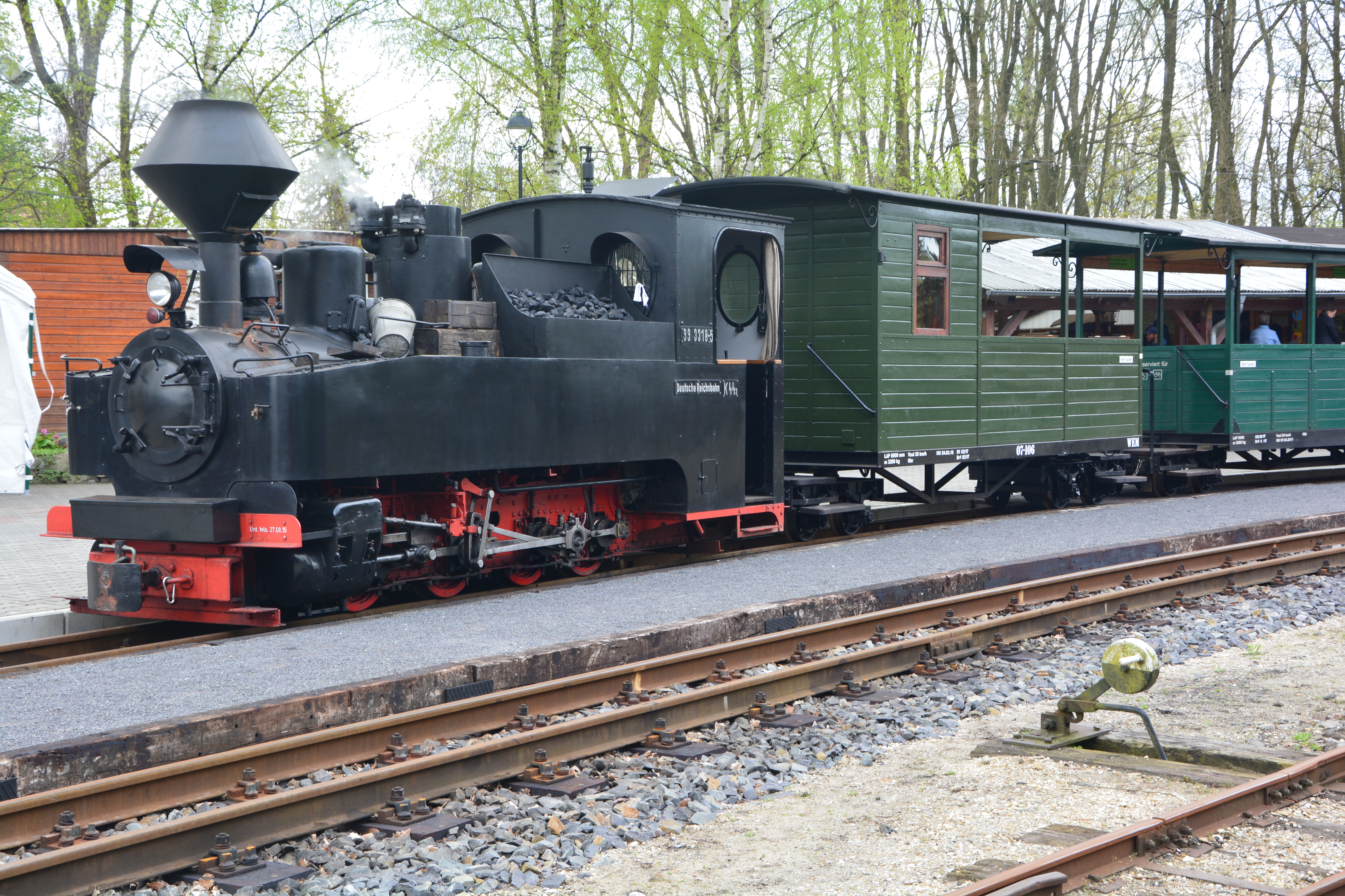 Waldeisenbahn Bad Muskau: Einweihung der "Tonbahn" am 14. bis 17. April 2017. Dampflok BR 99 3318-5, Baujahr 1919